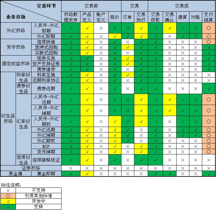 吴语: IMIX协议中定义报文的覆盖范围